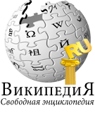 Premia Runeta Russian Wikipedia logo